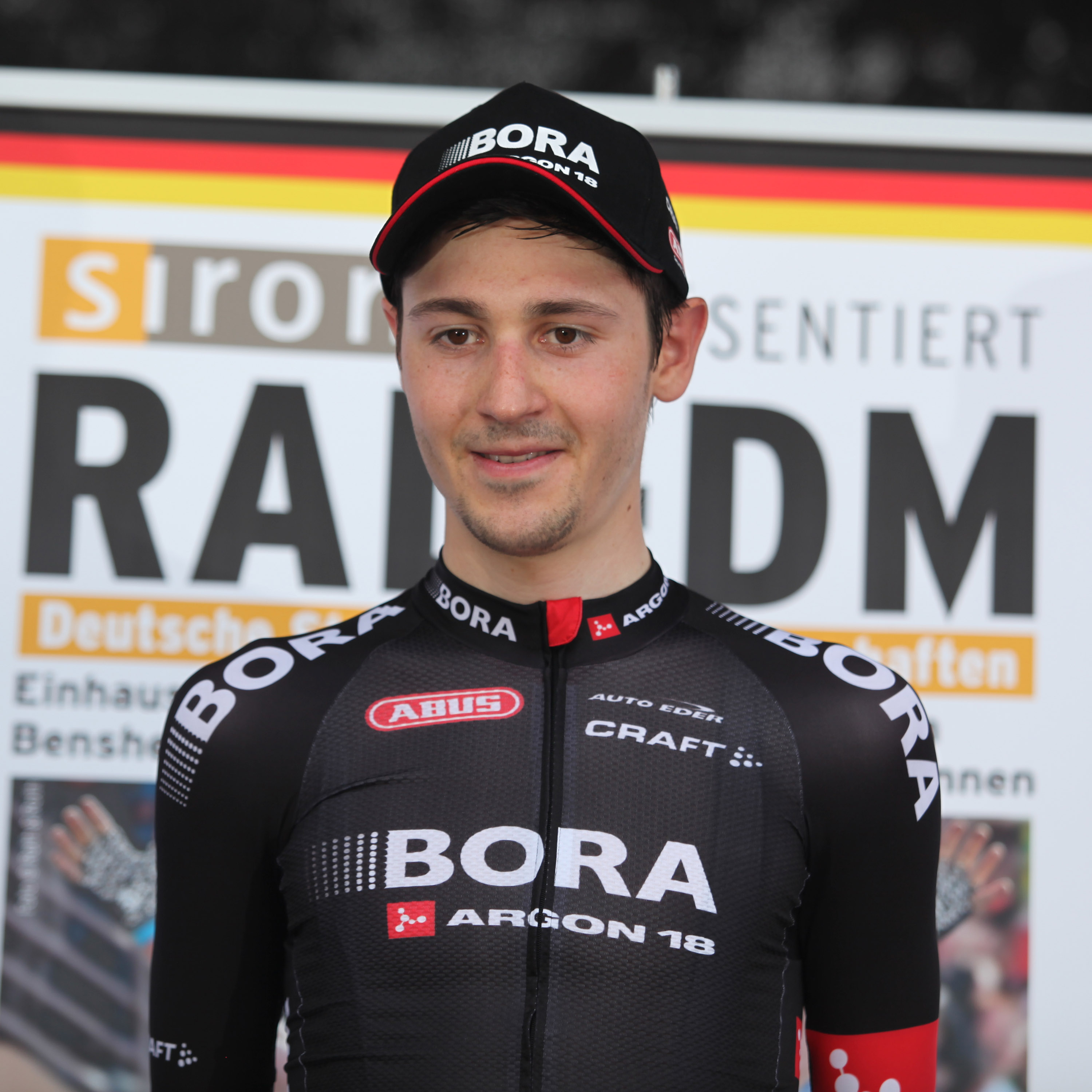 Emanuel Buchmann bei der Siegerehrung. Foto von den Deutschen Meisterschaften im Straßenrennen der Männer (Elite) am 28. Juni 2015 in Bensheim (Hessen)